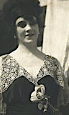 Haraszti Mici magyar színésznő